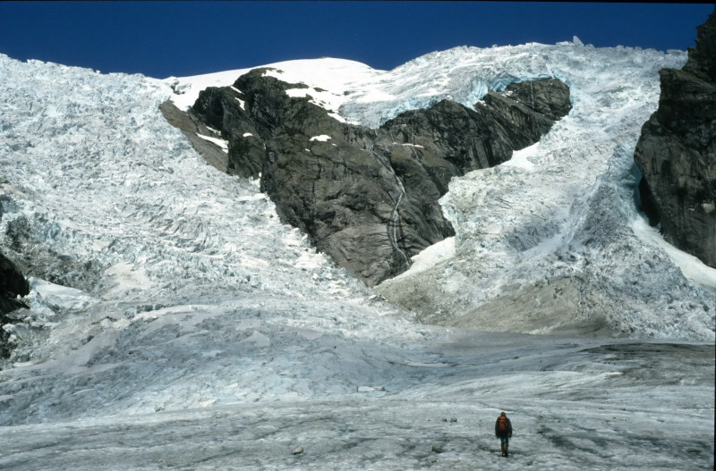 Brevandrer på vei opp Austerdalsbreen, en brearm på Jostedalsbreen. Brefallene Torsbreen og Odinsbreen bak.